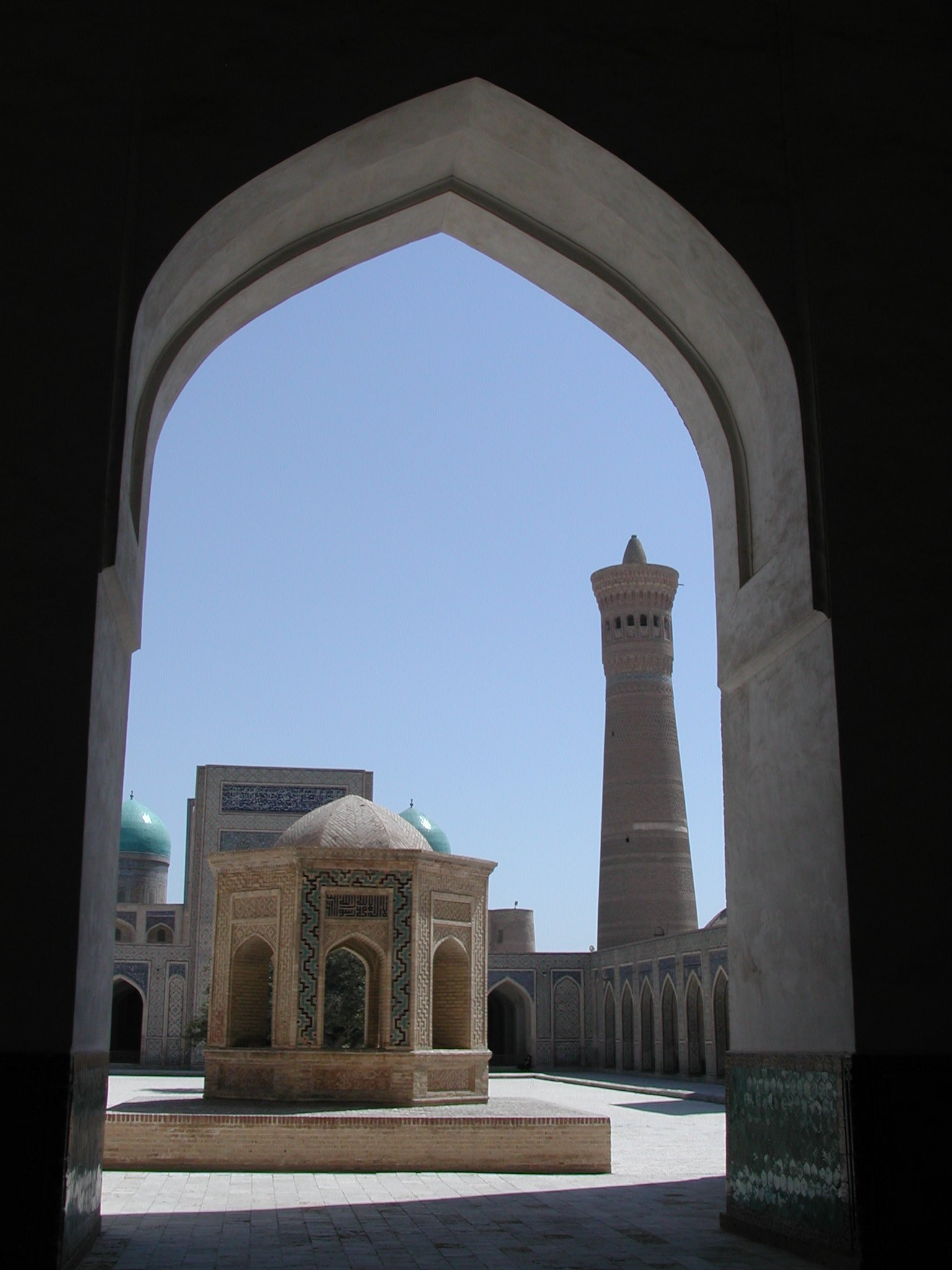 Boukhara : Minaret Minaret Po-i-Kalân